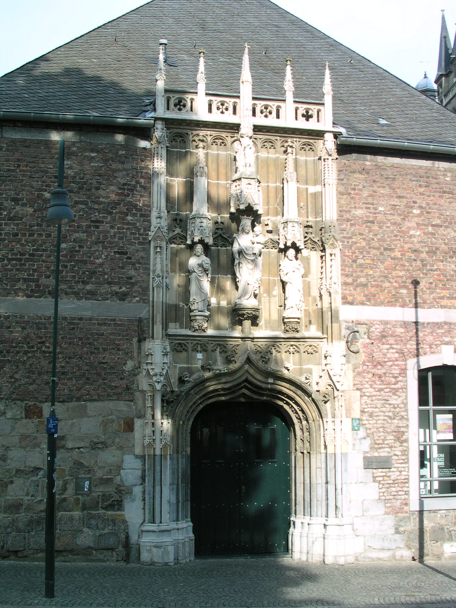 Aachen, Eingang zur Domschatzkammer, Klostergasse ("Kleines Drachenloch")